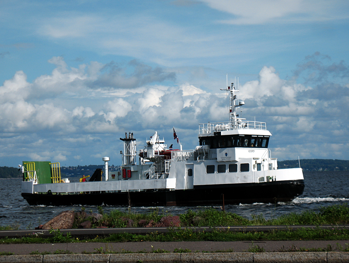 MF «Vederøy». Kriminalomsorgens ferge mellom Horten og Bastøy fengsel fotografert ved avgang Horten.